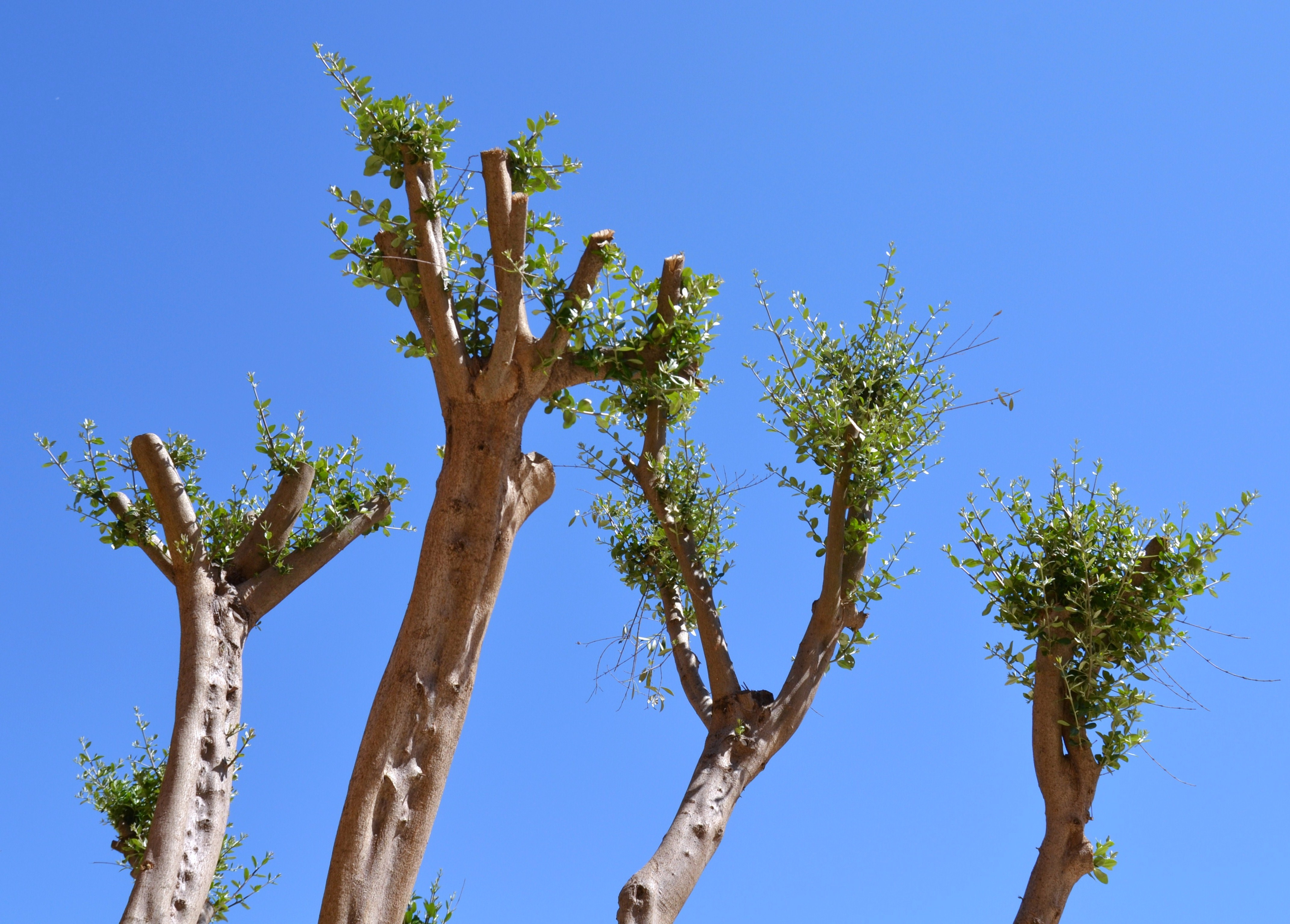 Olivera podada a València.